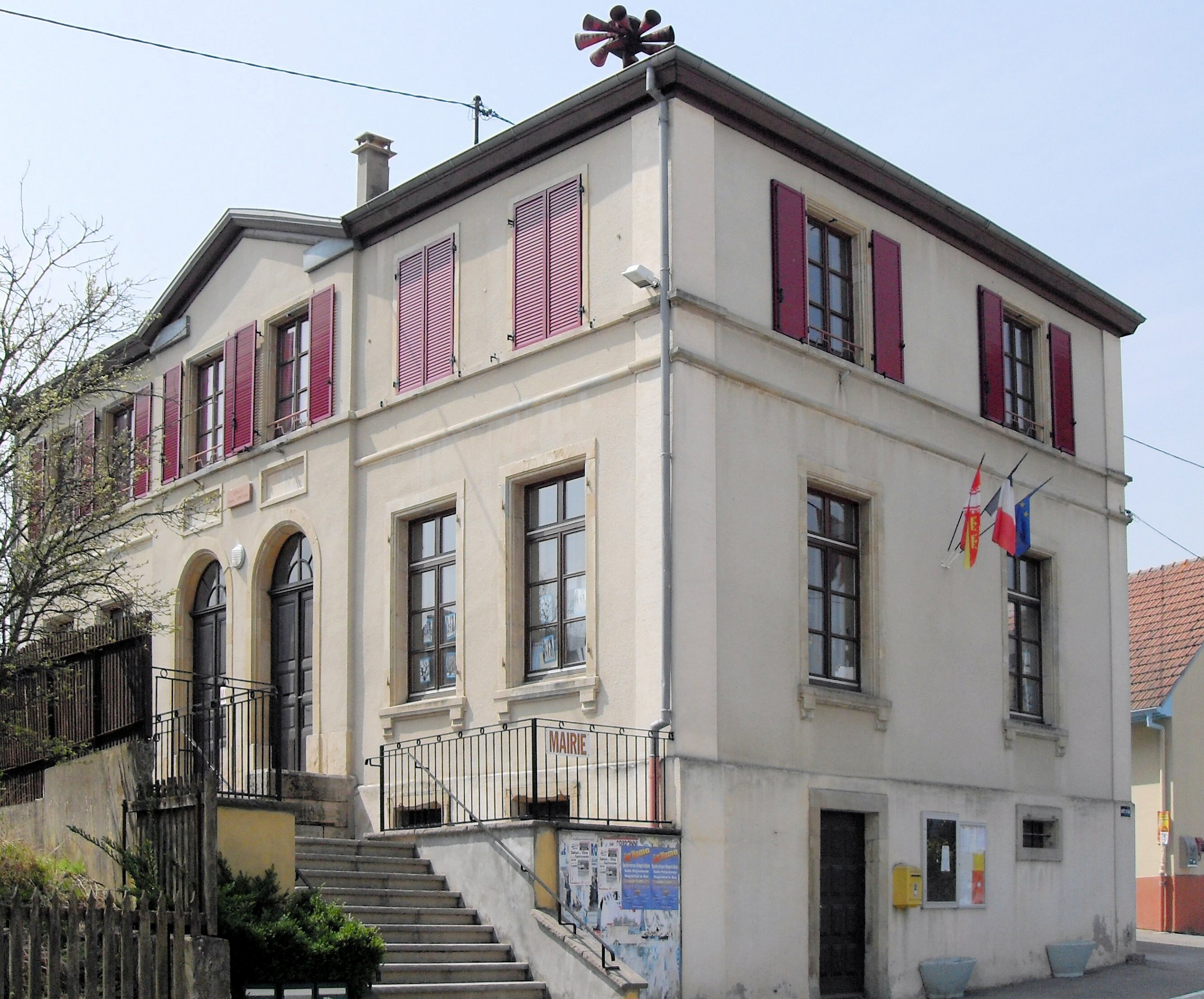 La mairie de Magstatt-le-Haut